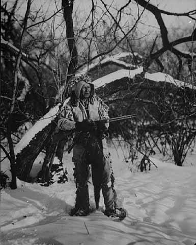 Ojibwe hunter in winter